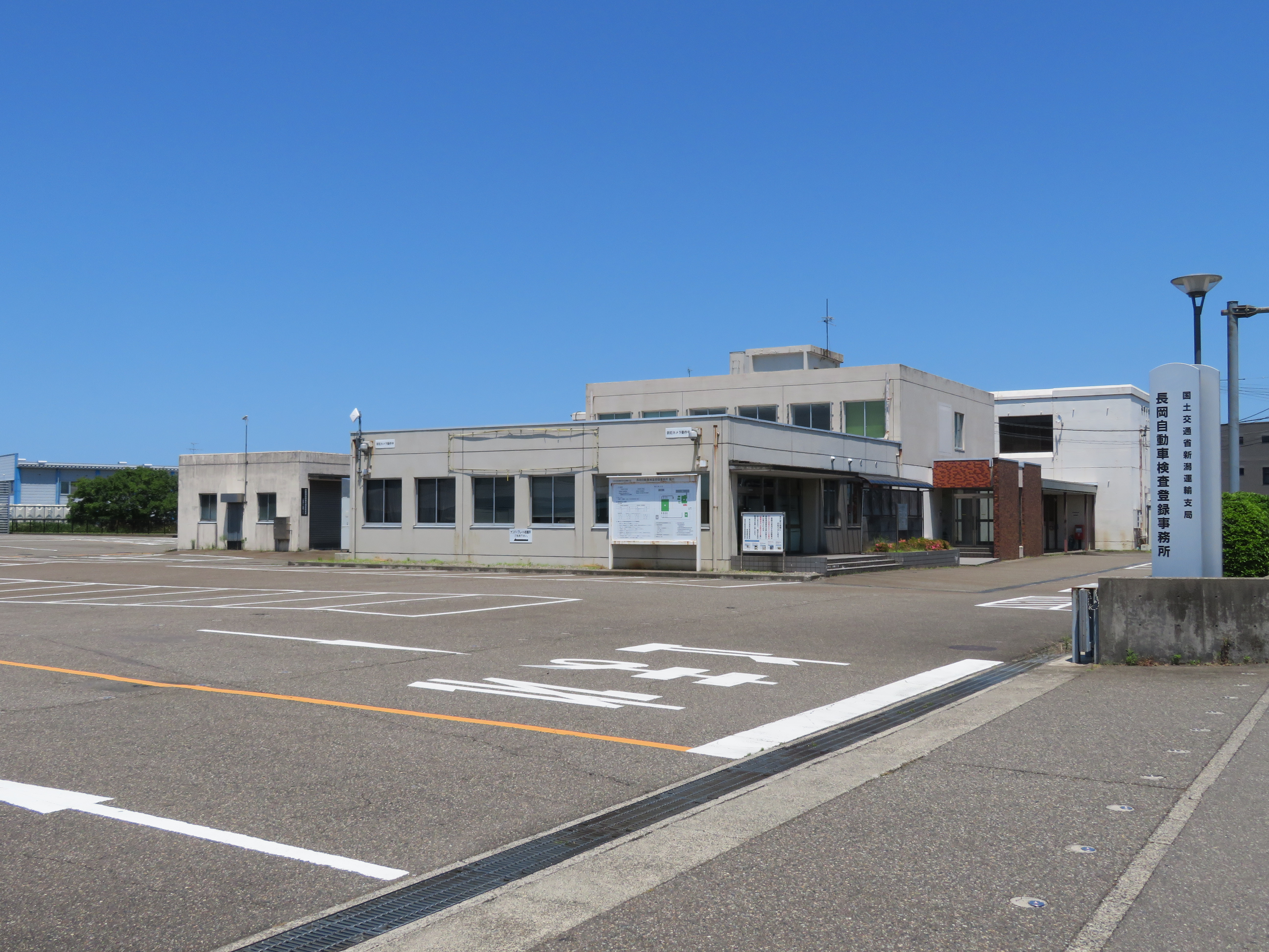 新潟県長岡市に所在する新潟運輸支局長岡自動車検査登録事務所 Canon PowerShot SX720 HS